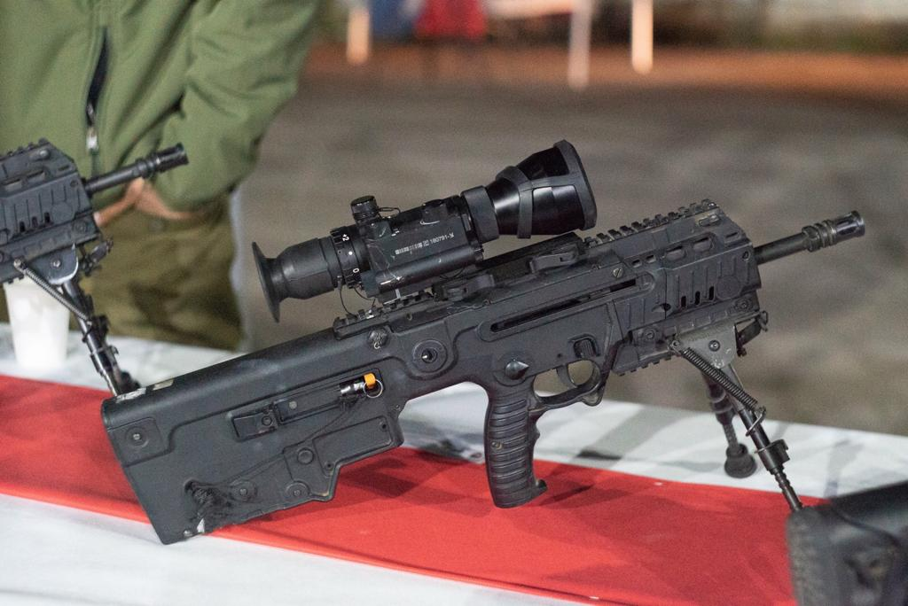 מיקרו תבור עם כוונת ליאור X4 פוקוס משתנה. פיתוחי הנשק שהציגה מחלקת האמל"ח בזרוע היבשה למפקדי צה"ל הבכירים. מקלעים משוכללים וכוונות דיגיטליות, תצפית נשלטת מרחוק ומטול שיירה רקטות קטנות - אלו רק חלק קטן מפיתוחי הנשק.